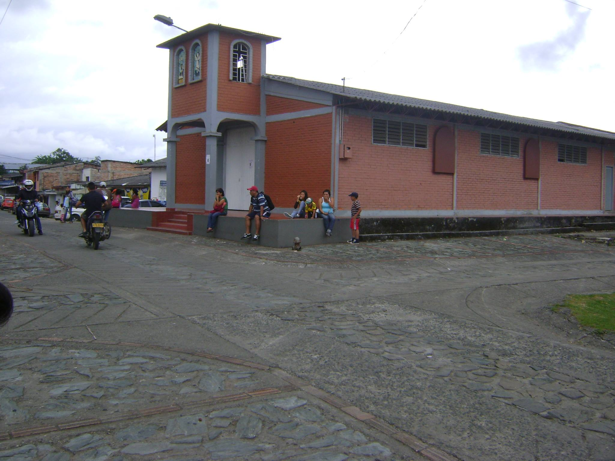 Iglesia de Puelenje, parque principal con calles empedradas.